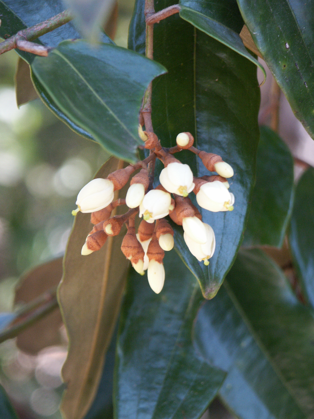 Leptolaena multiflora, Sainte Luce, Madagascar